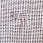 Detalj av stramaljeffekt i gardintyg. . Detalj från här